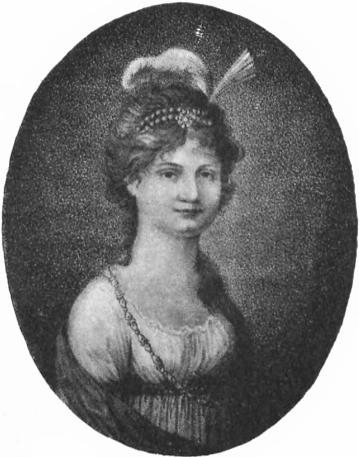 Maria Augusta Nepomucena Wettyn